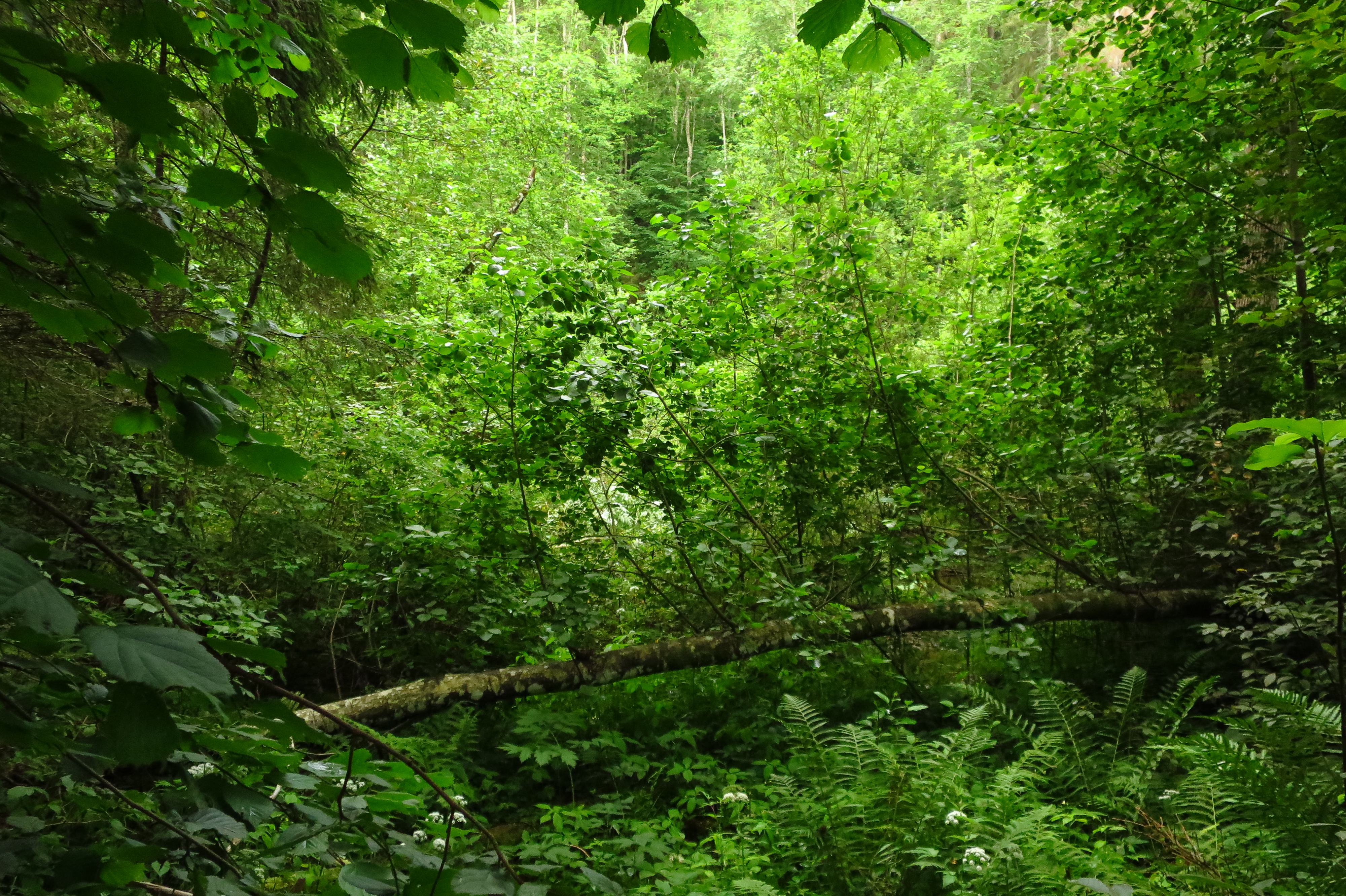 Kanahaua sulglohk, Kanahaua MKA